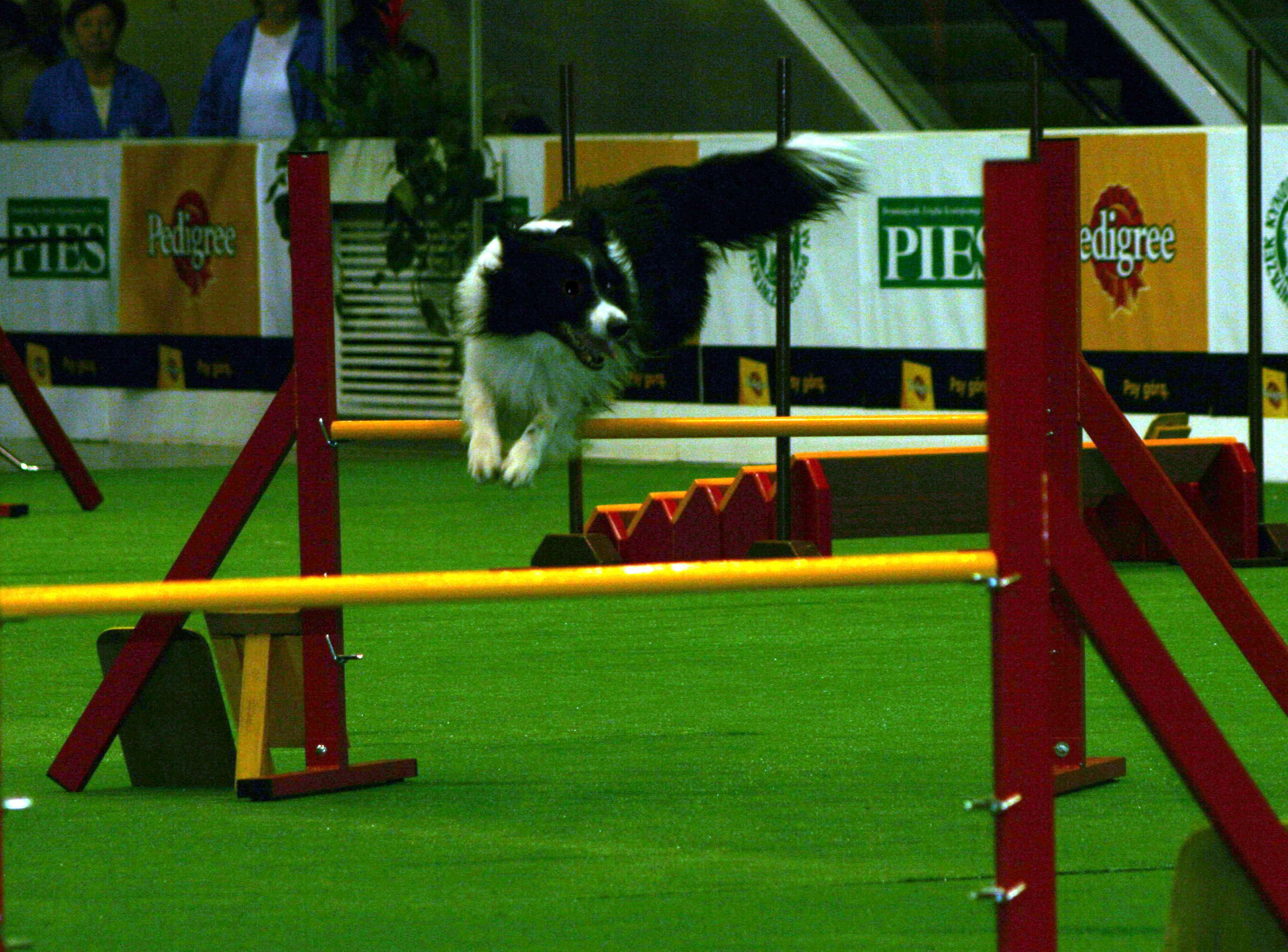 Border Collie na Światowej Wystawie Psów Rasowych w Poznaniu podczas agility.